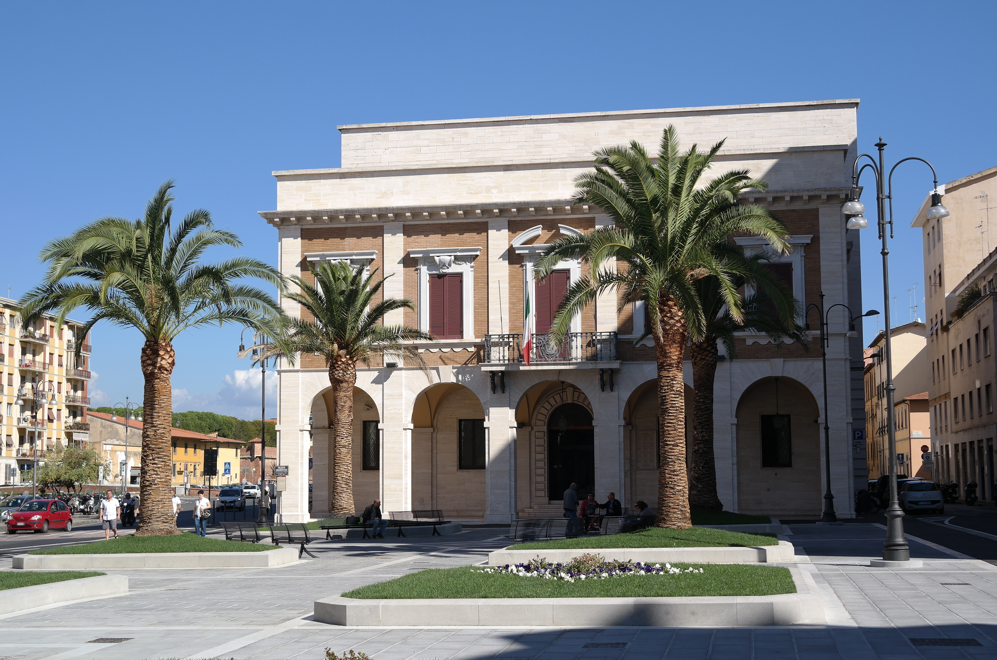 Piazza del Municipio a Livorno dopo i lavori di riqualificazione e sullo sfondo il Palazzo della Provincia